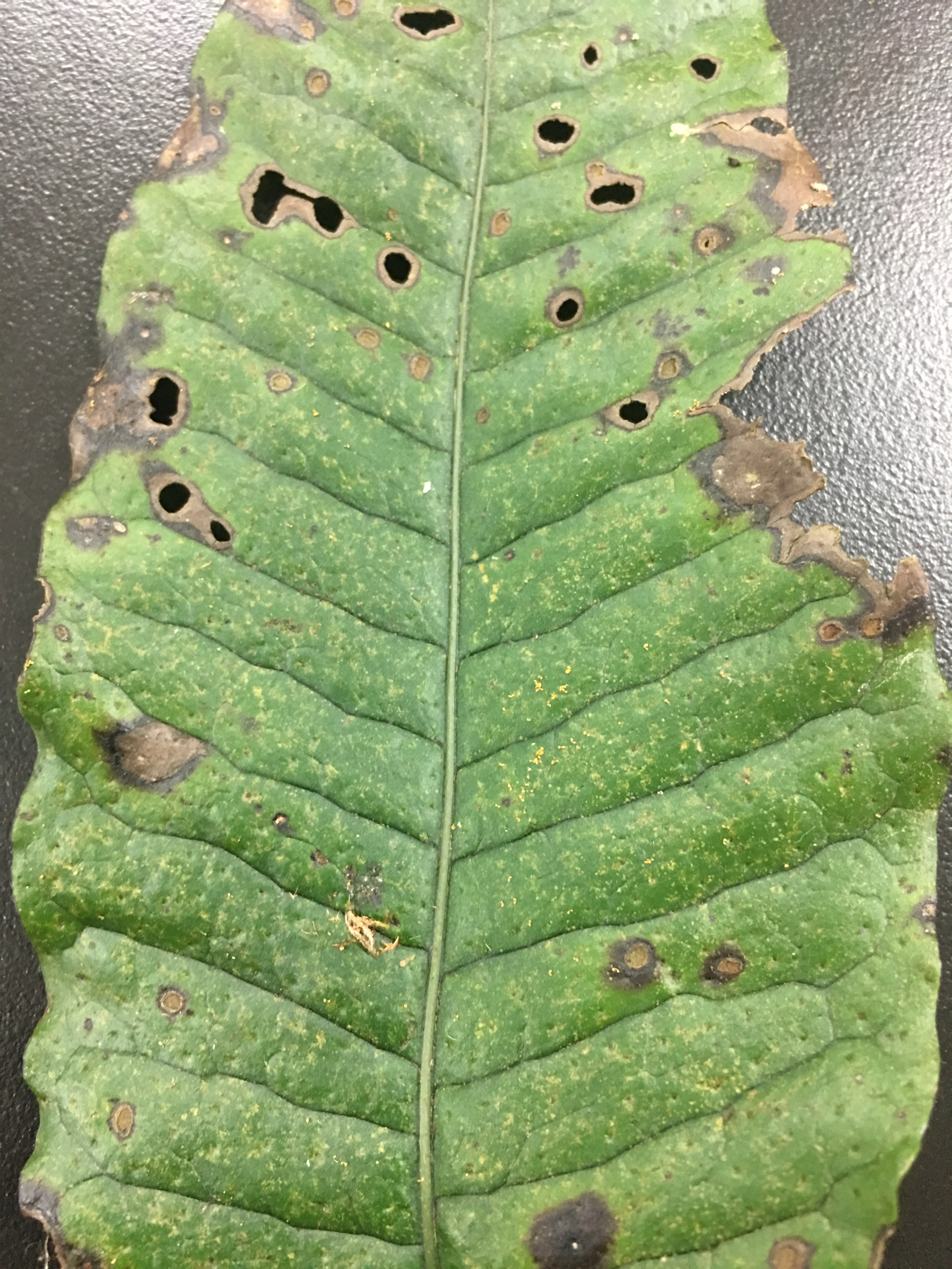 萊蕨營養葉表具有圓形下凹小點